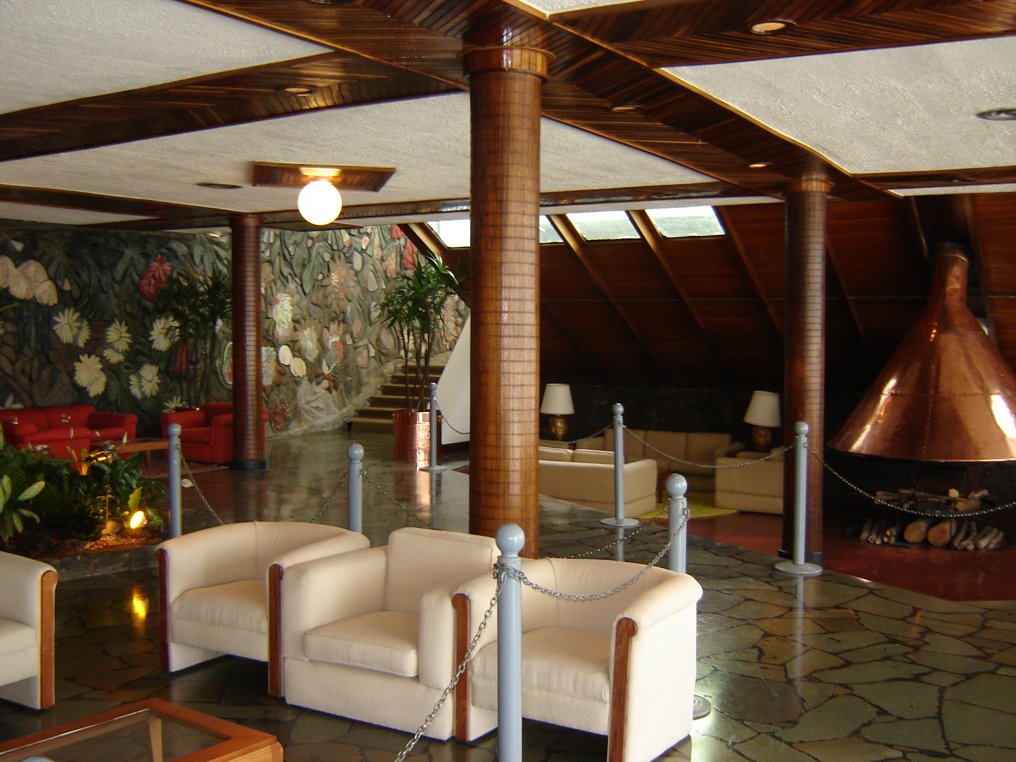 Lobby (vestíbulo) del Hotel Humboldt, Caracas, Venezuela.